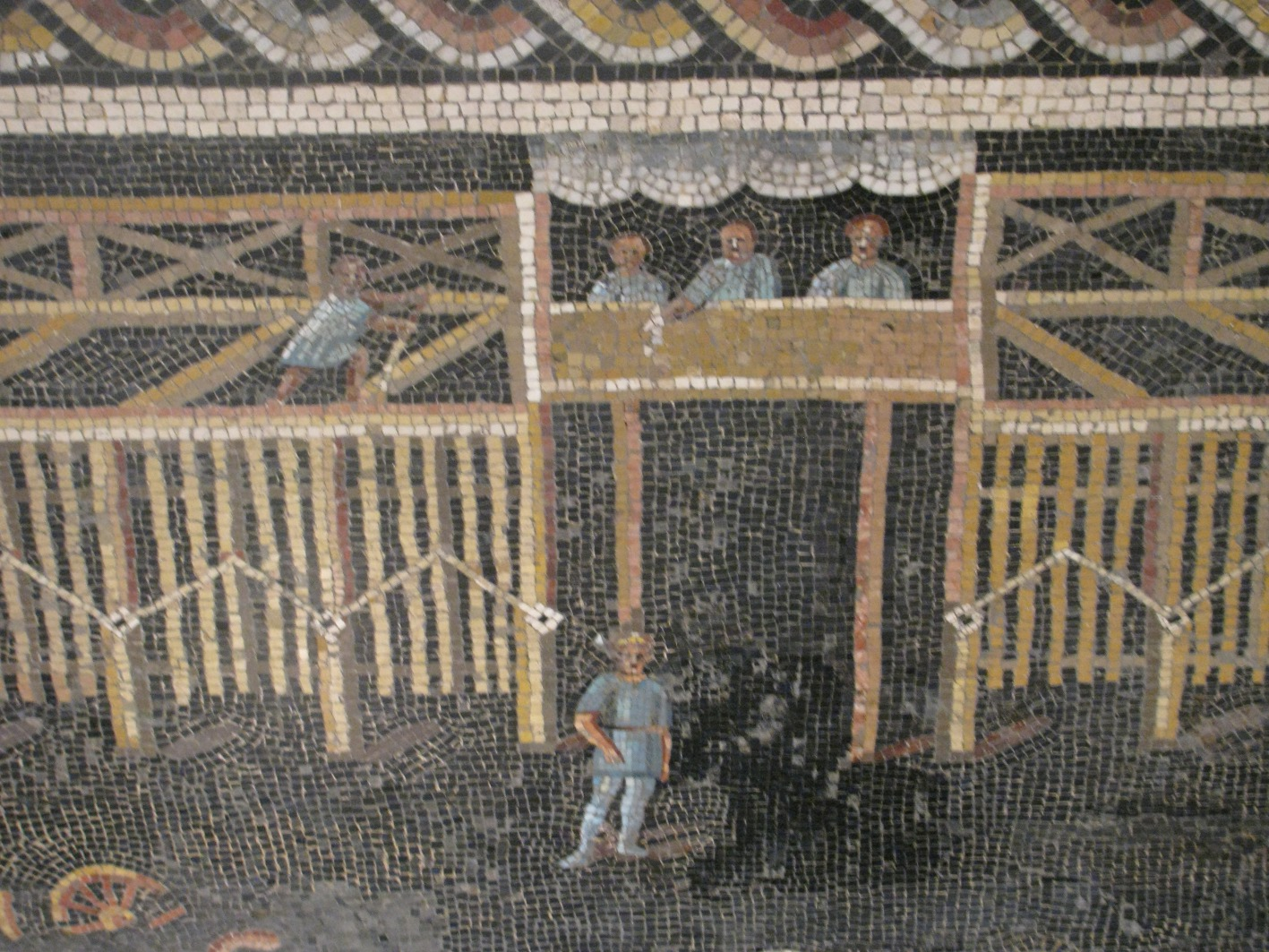 Mosaïque des Jeux du cirque (Lyon), détail : vue des carceres et des organisteurs